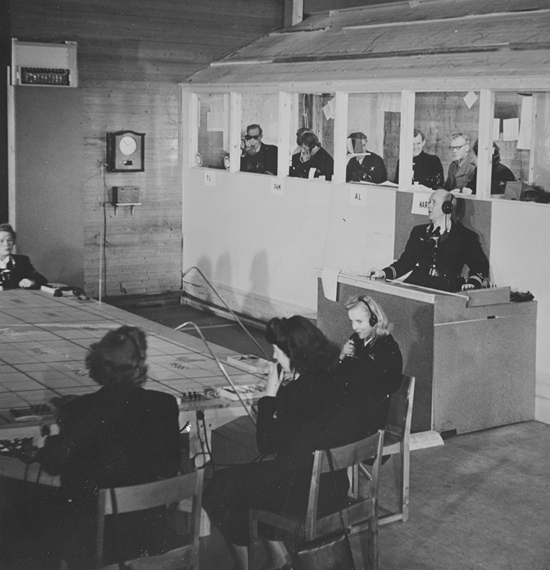 Interiör av luftförsvarscentral i Norrköping, år 1951. Med luftförsvarslottor,luftbevakningsledare med flera. Tillhör Flygvapenmuseums bildarkiv.